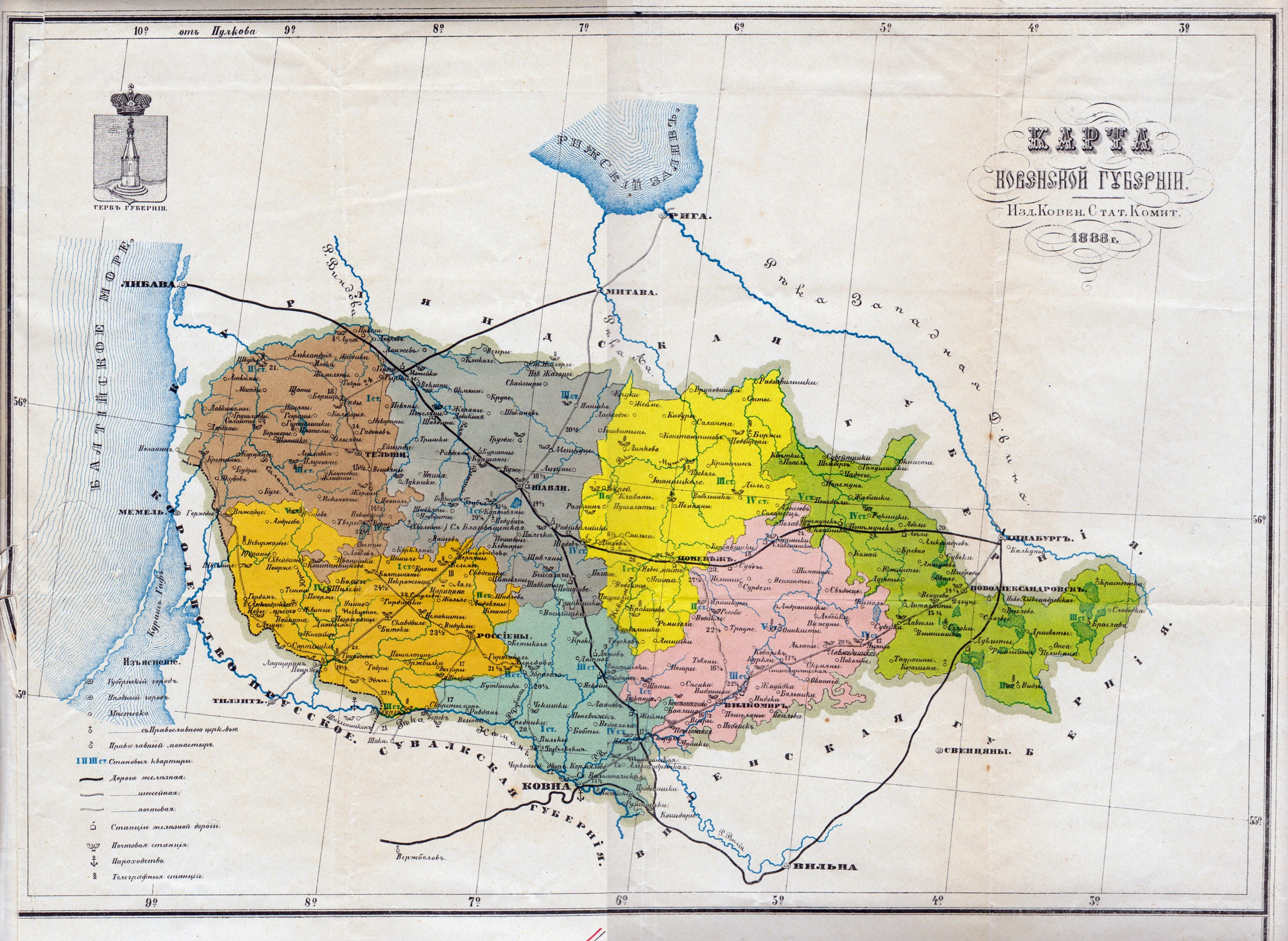 Карта Ковенской губернии. 1888 год.